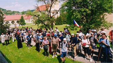 Start zur Fußwallfahrt Hellerhof-Mariazell 2004